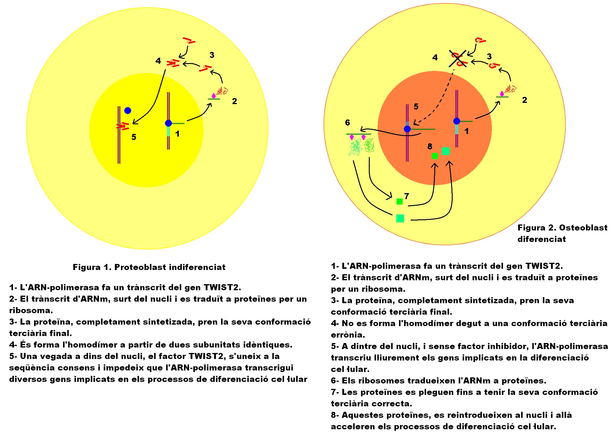 De forma esquemàtica es representen les principals conseqüencies d'una bona funció i d'una mala funció de twist2